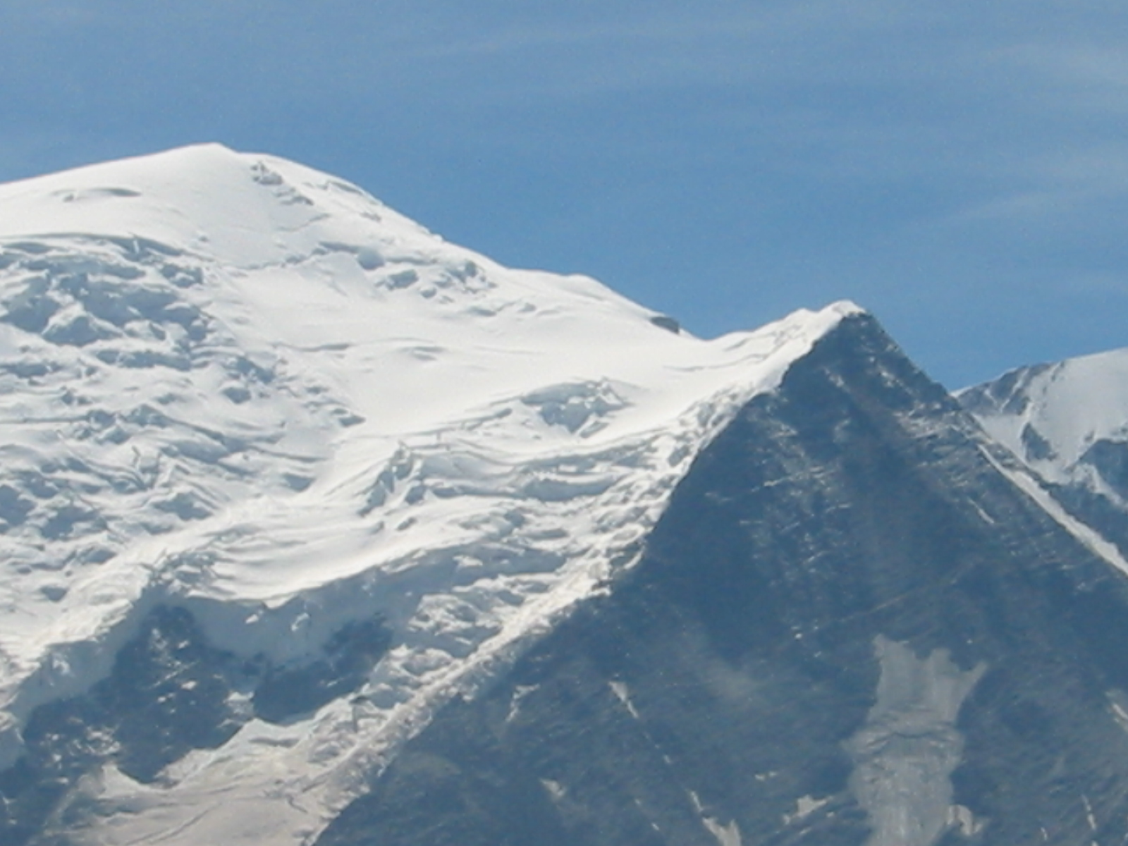 Le dôme et l'aiguille du Goûter depuis le Brévent, août 2006.